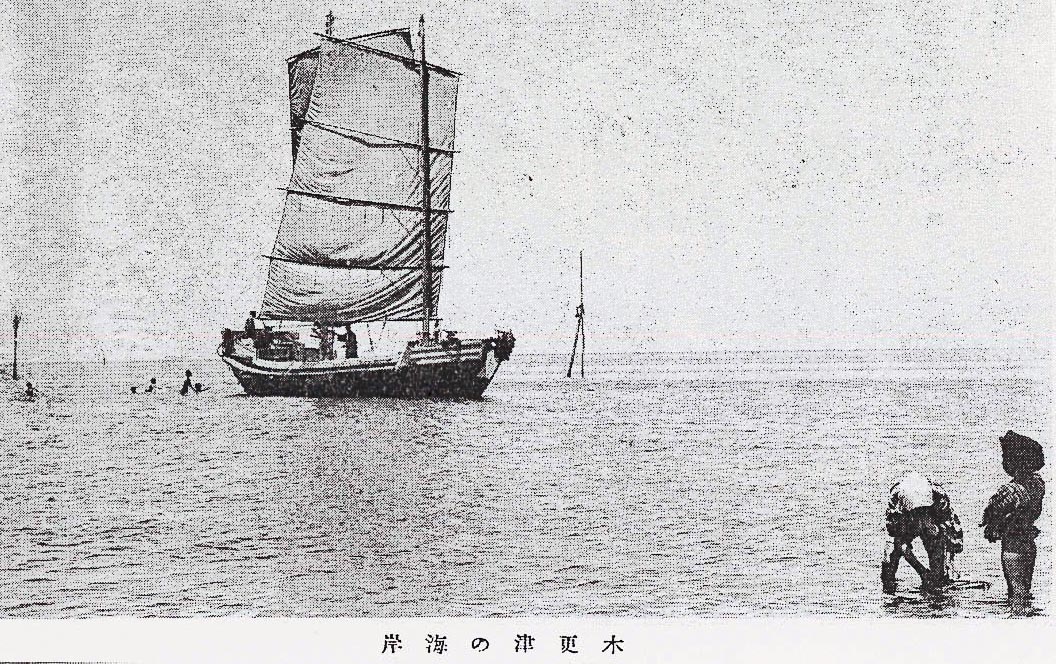 明治末期、木更津の浅瀬での五大力船と潮干狩りをする人